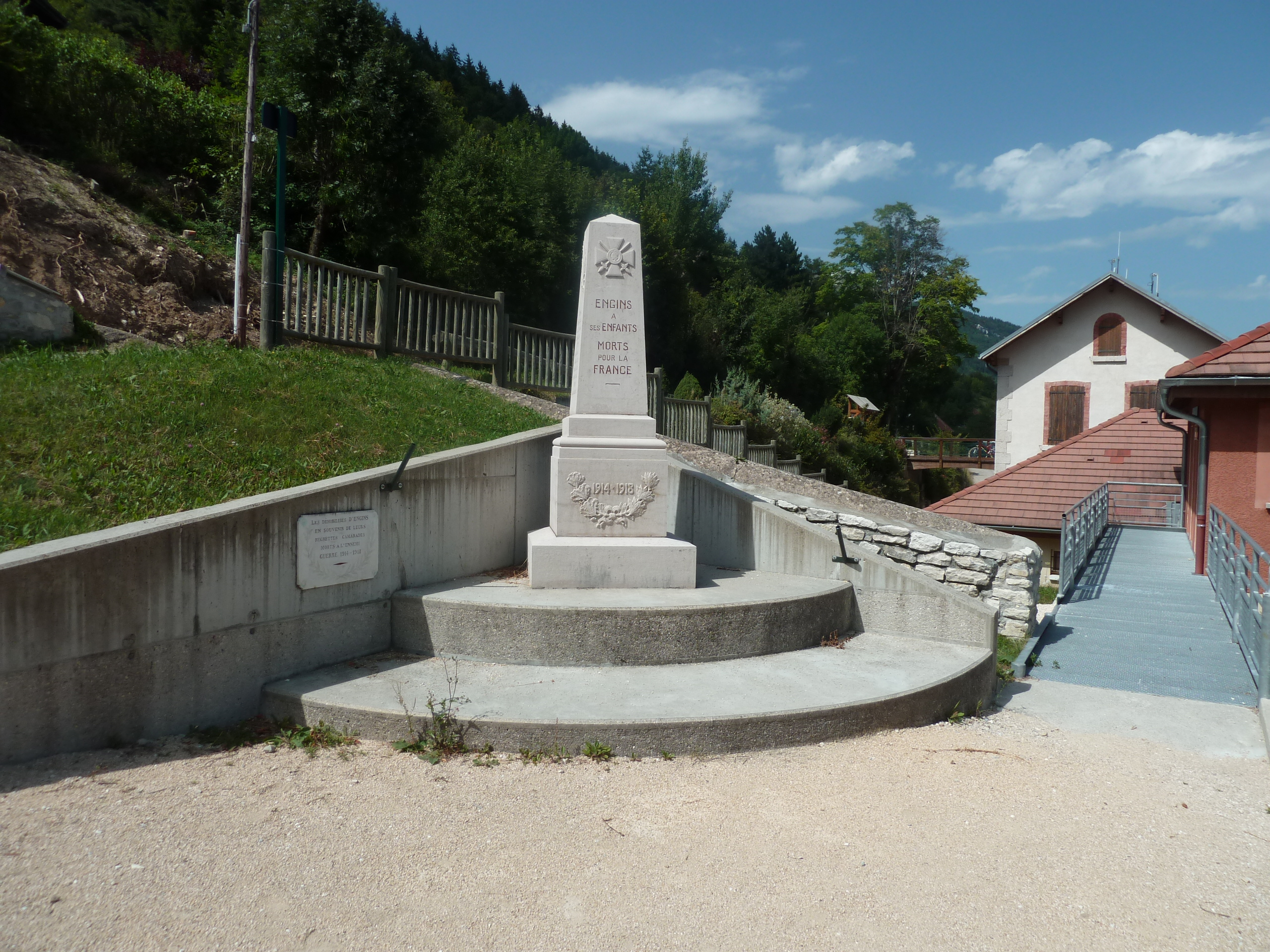 Engins (38) : Le monument aux morts.